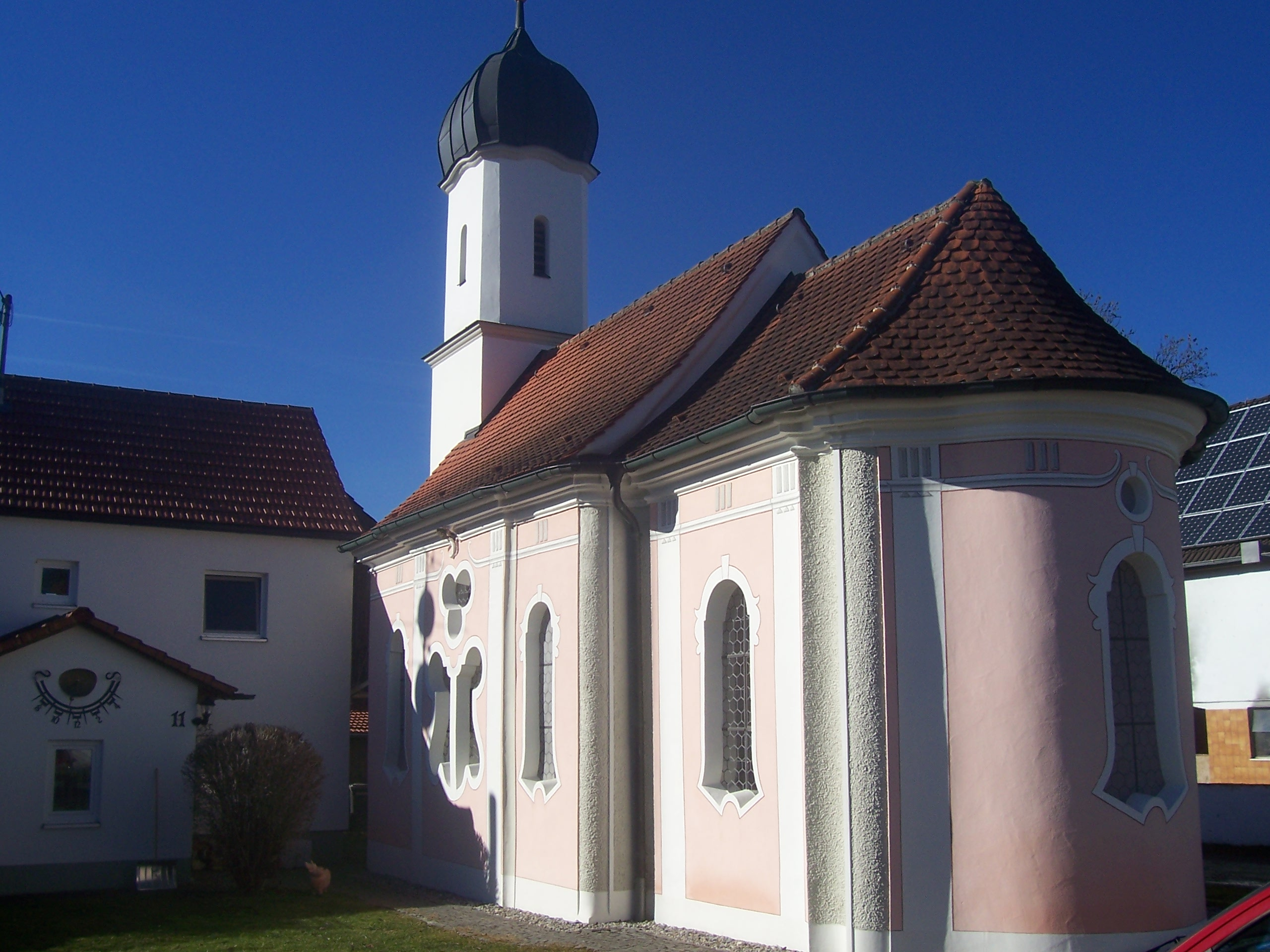 Römisch-katholische Kirche zur Allerheiligsten Dreifaltigkeit in Dietershofen, Landkreis Neu-Ulm, Bayern; Südostansicht